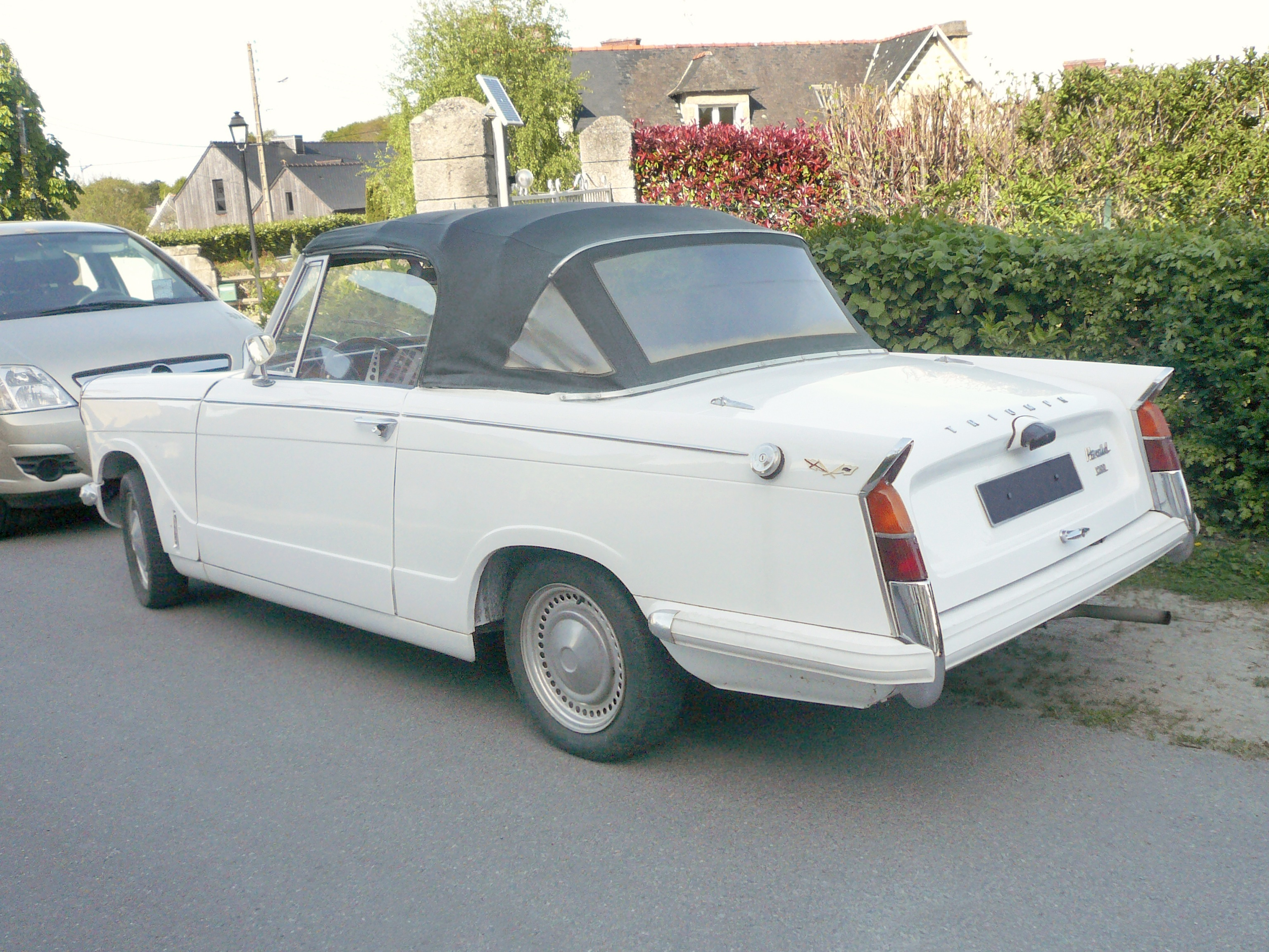 Triumph Herald 1200, arrière.